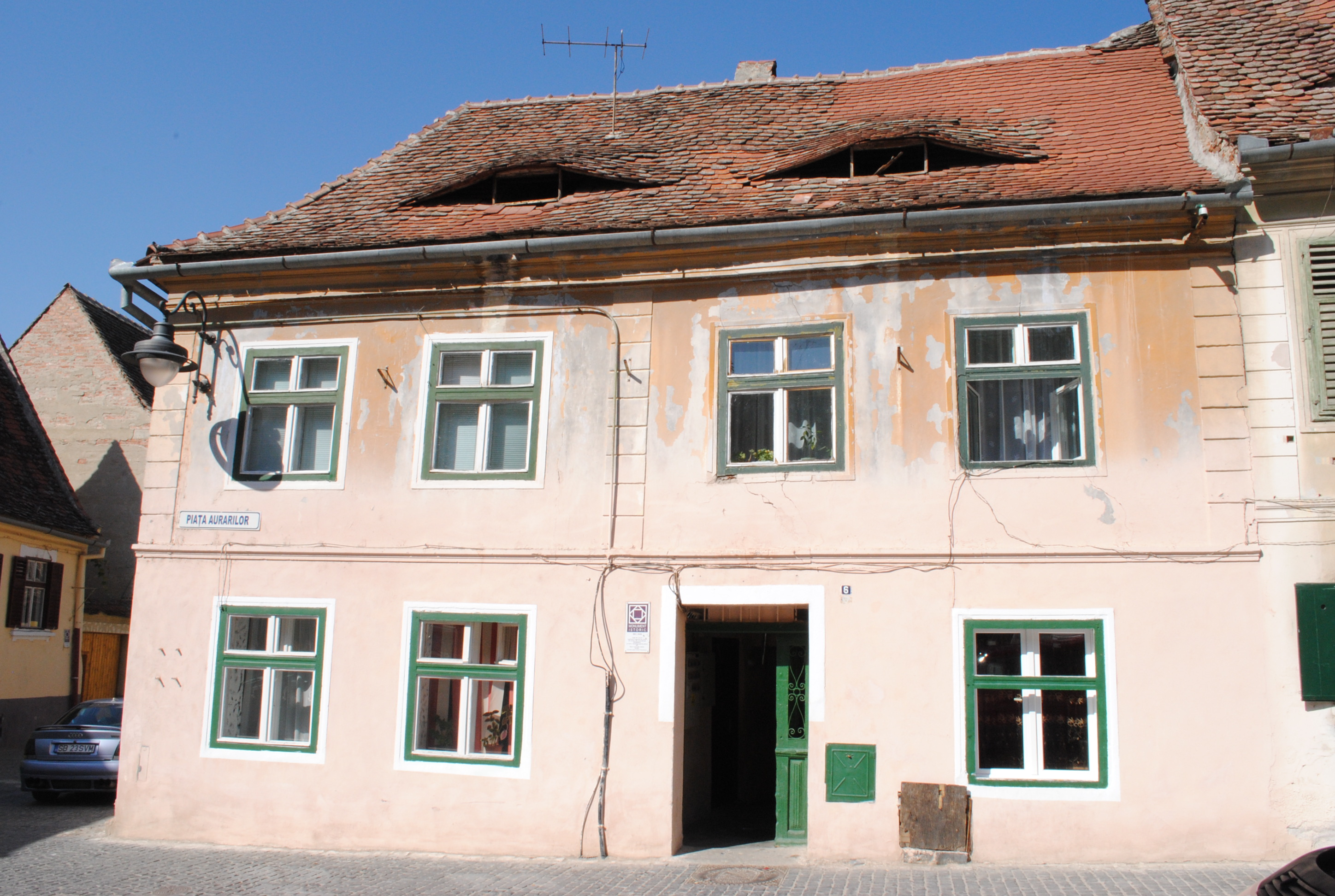 Casă, 1400 - 1425, sec. XVIII - primul sfert al sec. XX